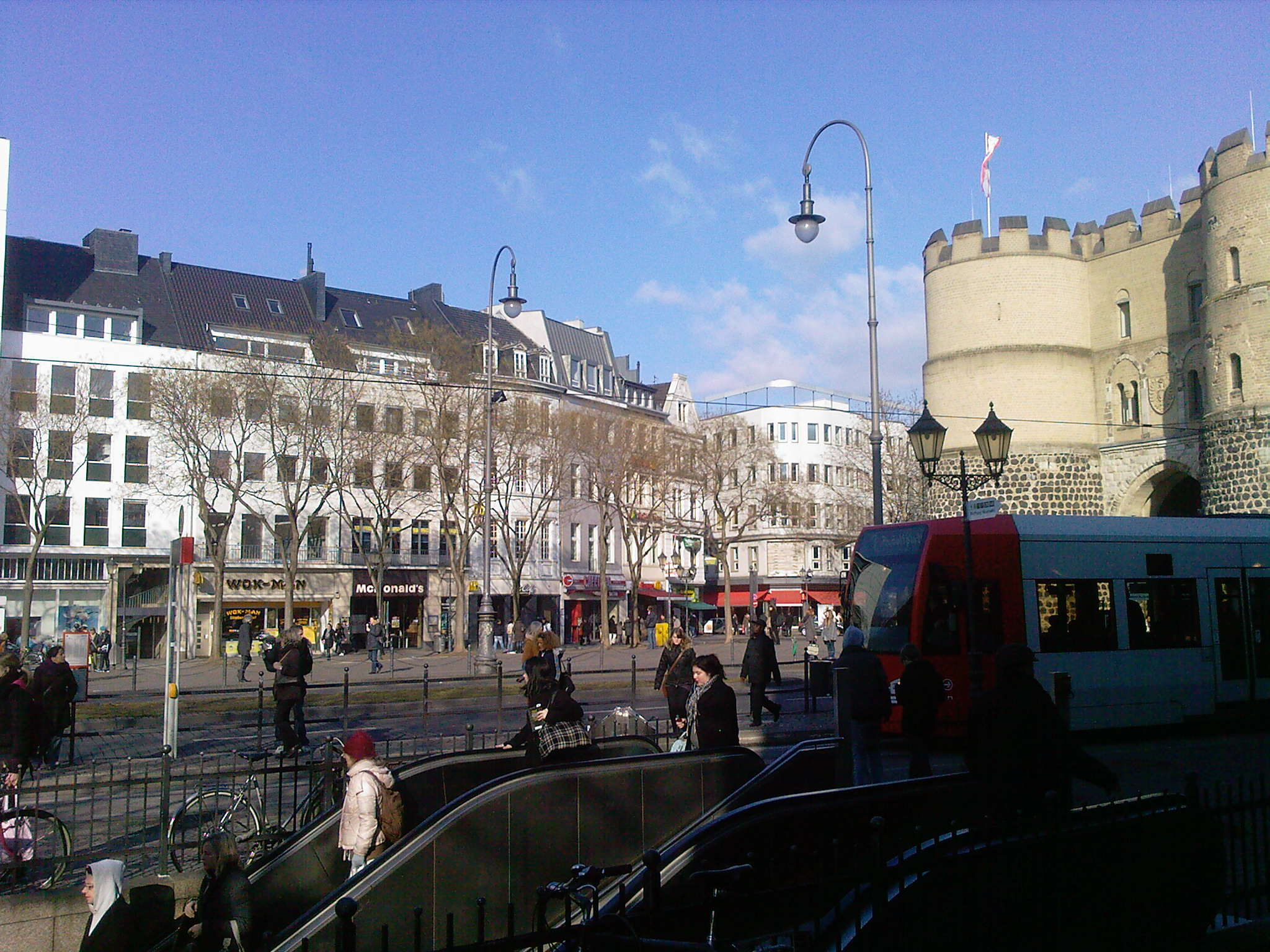 Rudolfplatz, Köln